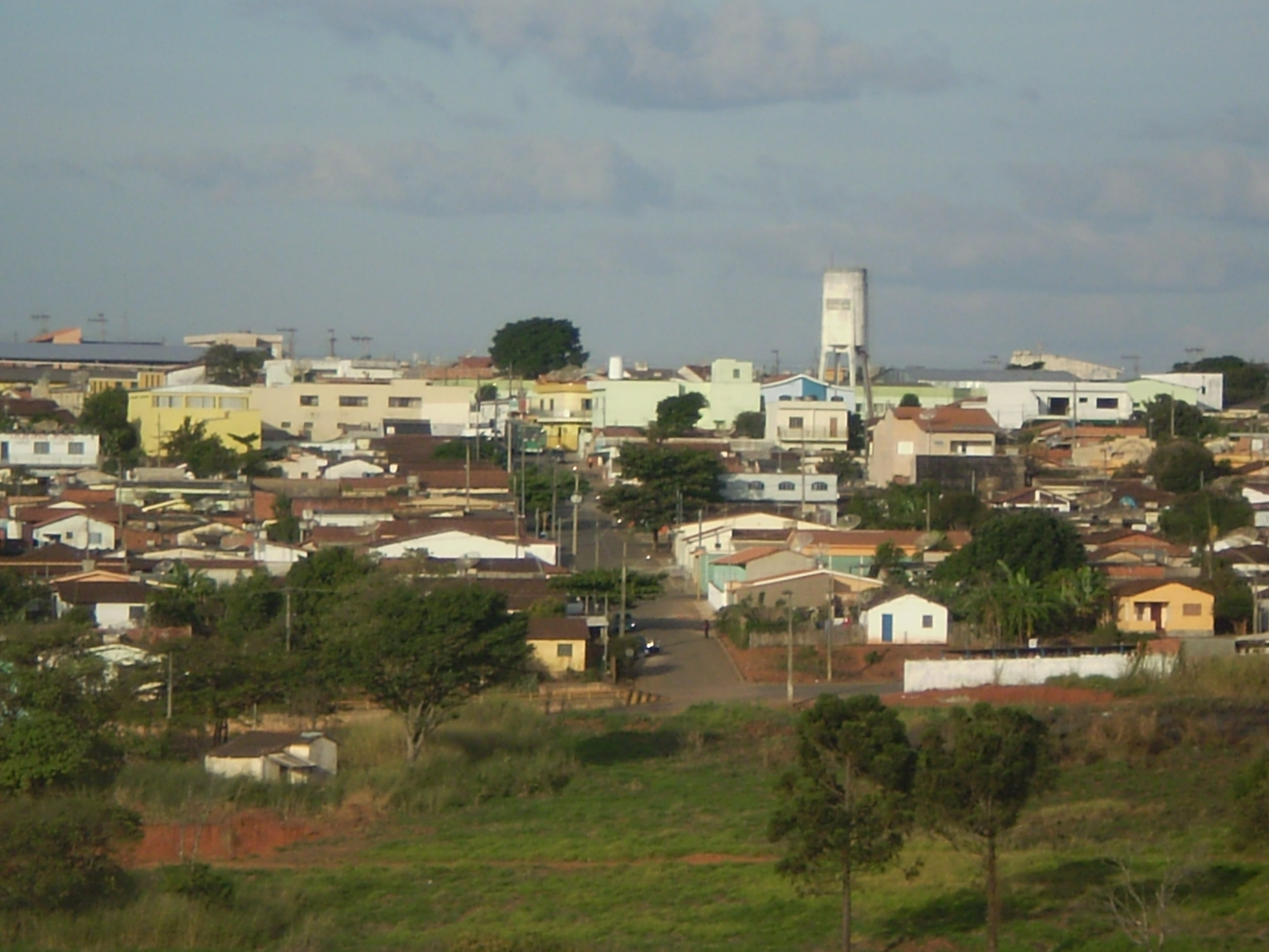 paisagem tipica